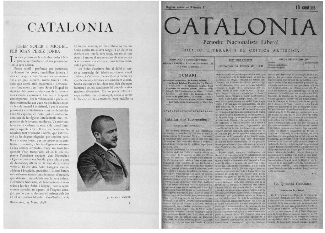 Comparació formal entre les dues etapes de la revista Catalonia